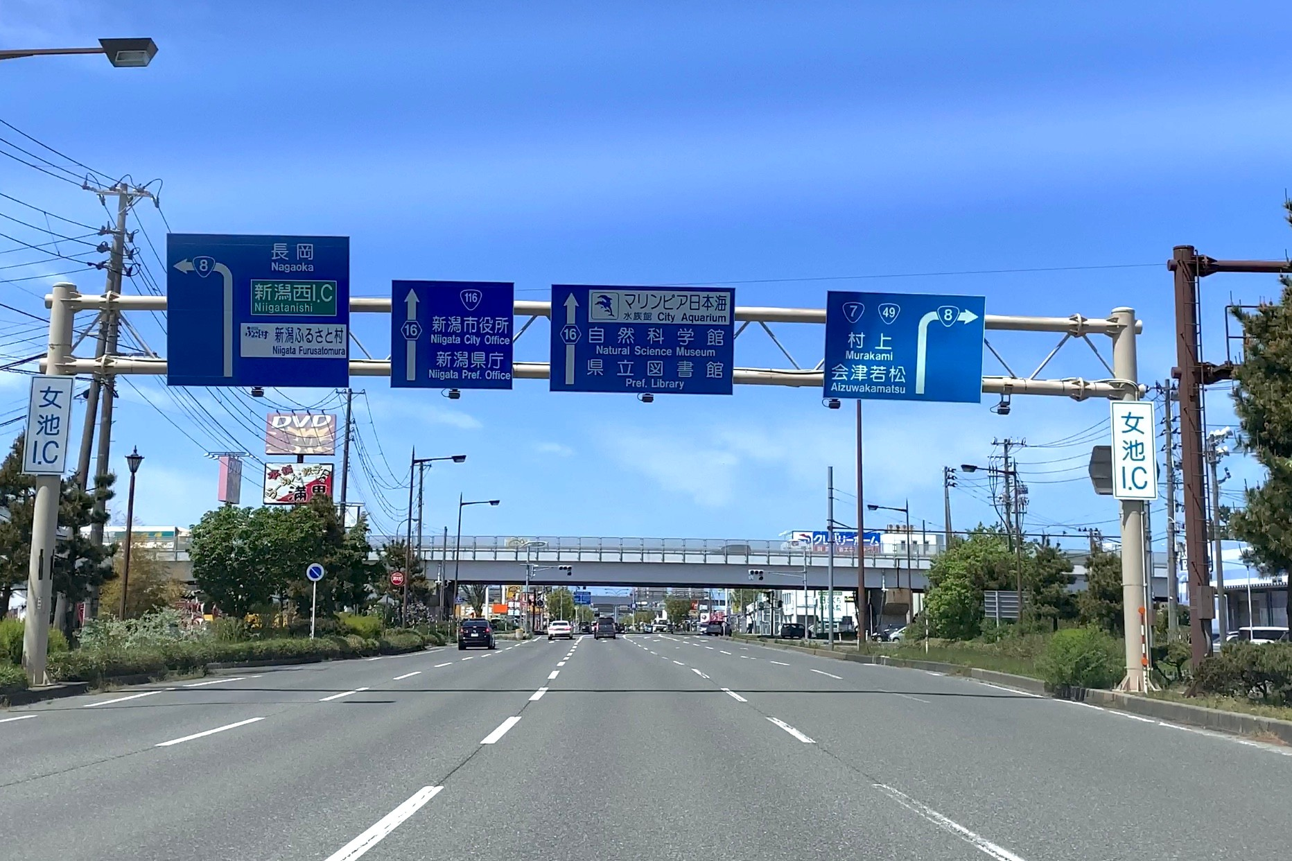 新潟県道16号新潟亀田内野線・新潟バイパス 女池IC（2020年5月）